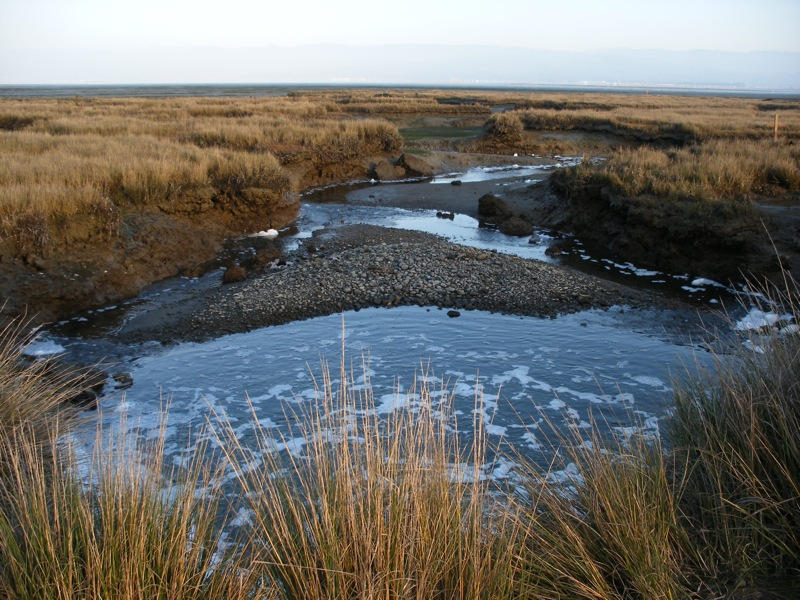 humboldt bay eureka